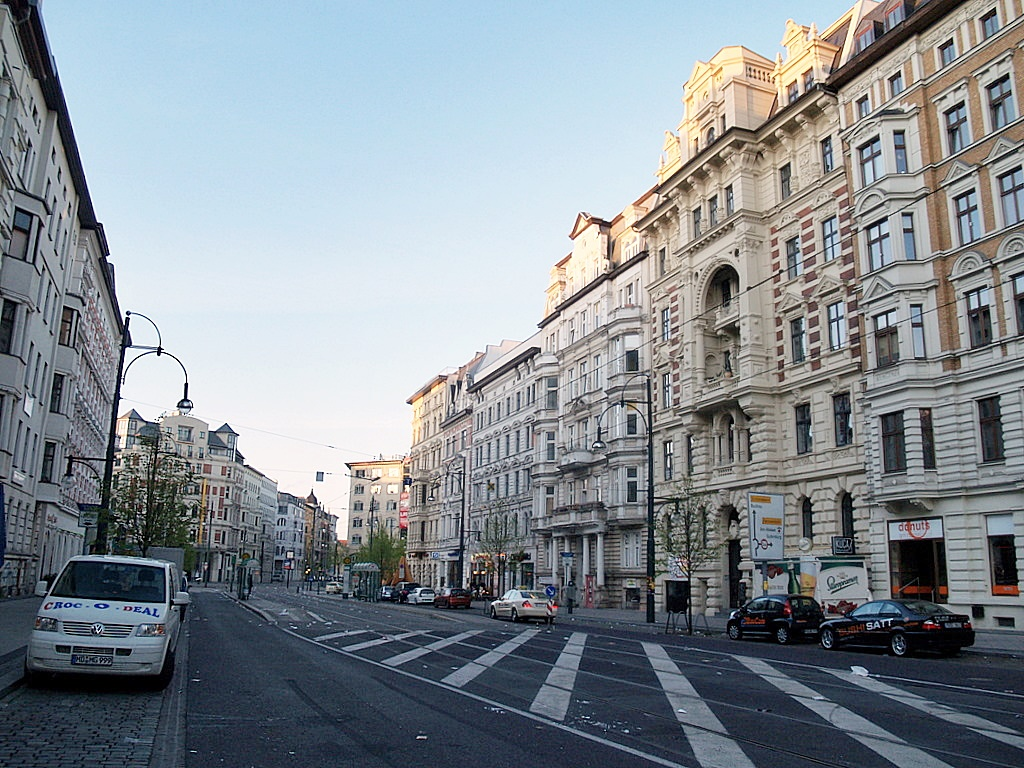 Otto-von-Guericke-Straße Magdeburg